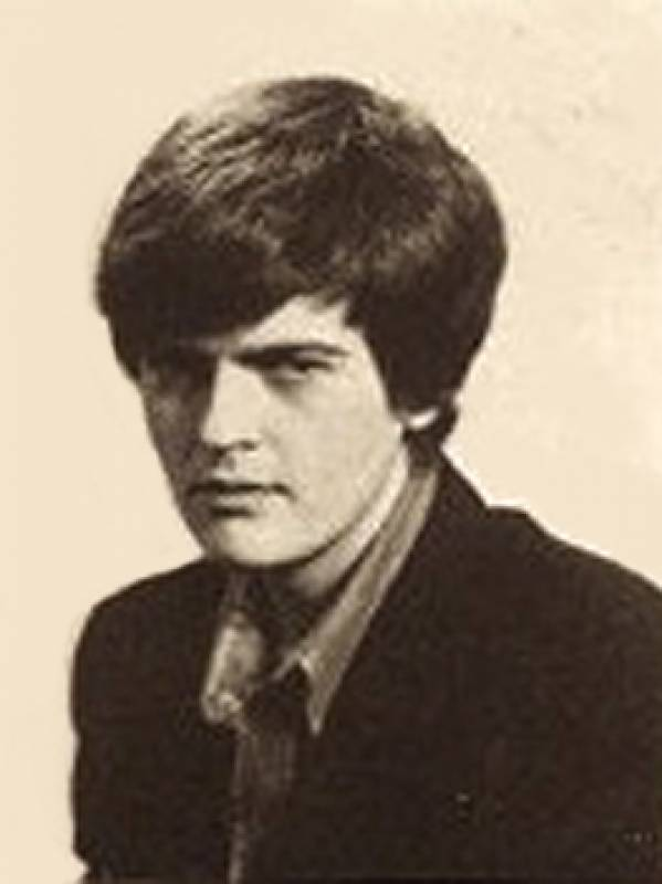 Scrittore e fumettista italiano